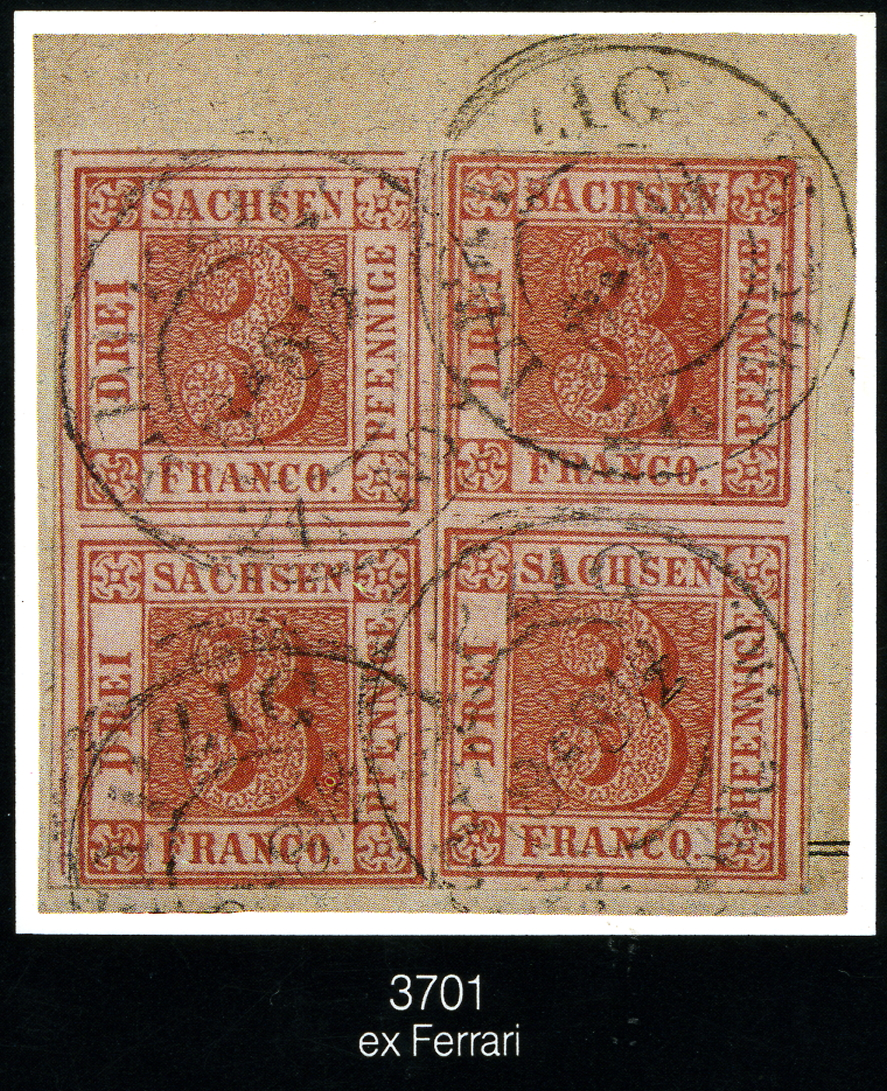 Sachsen 1850 - 2 Paare - Leipzig entwertung - ex Ferrari